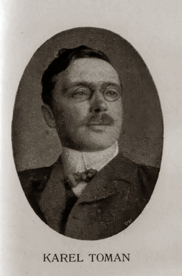 Karel Toman (1877 - 1846), Český básník, novinář a překladatel.